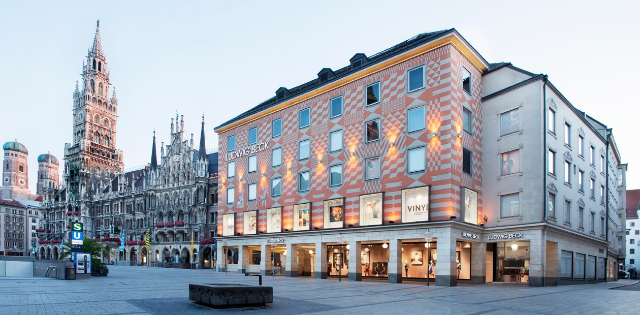 Blick auf das Kaufhaus Ludwig Beck am Rathauseck